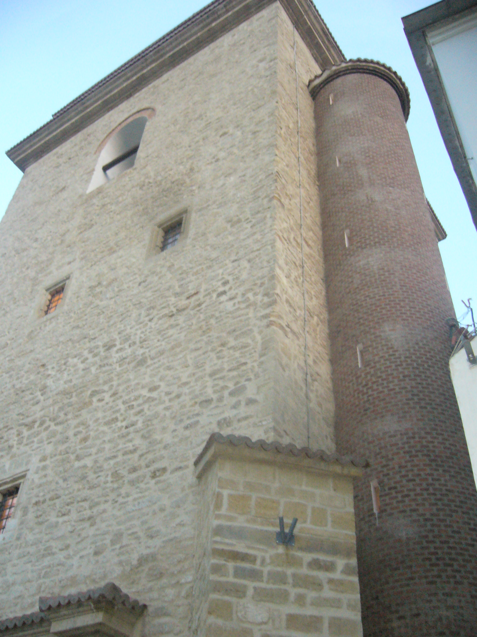 Iasi, sec. XVII